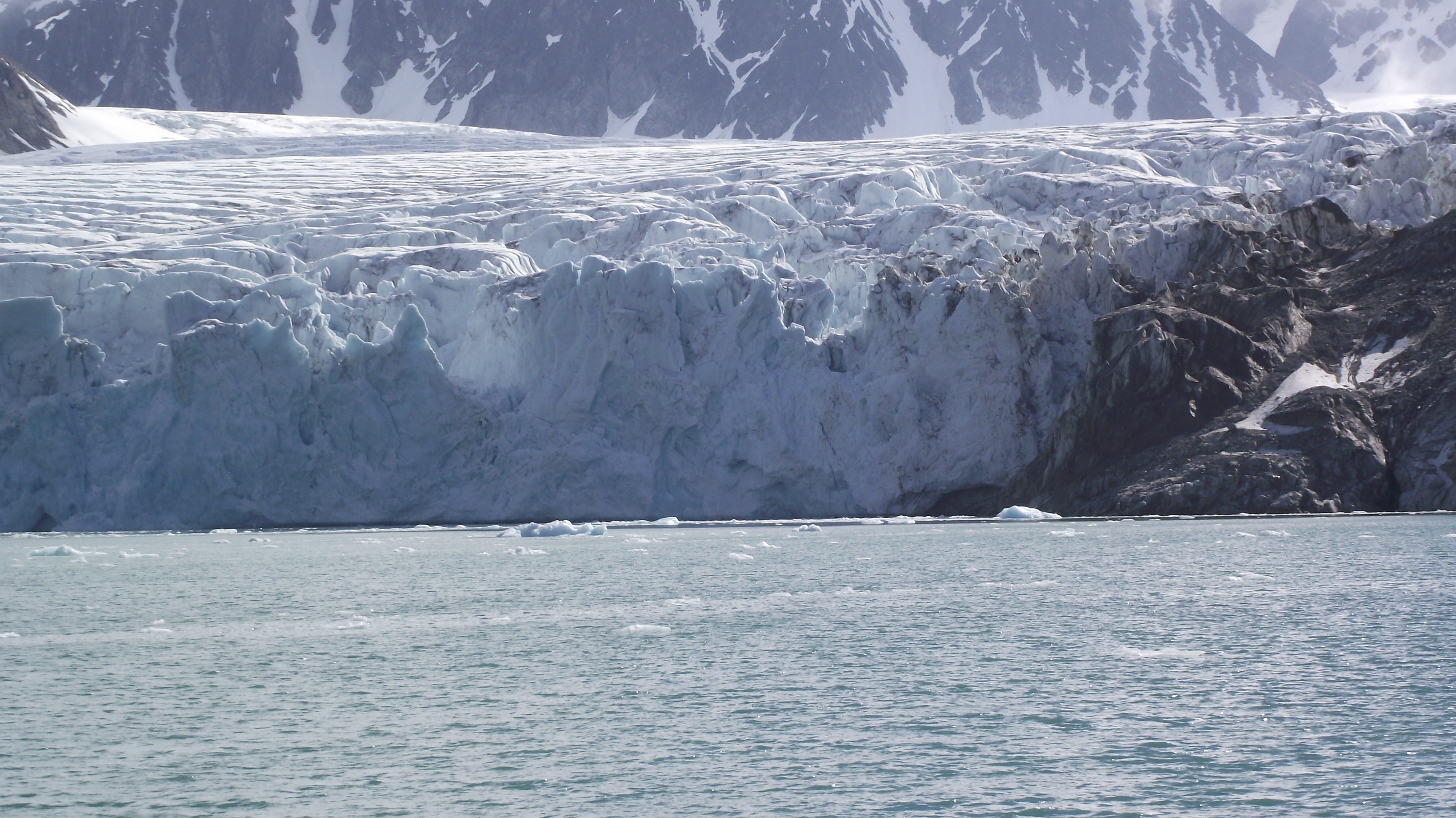 Waggonwaybreen aan de Magdalenefjorden bij Spitsbergen eiland